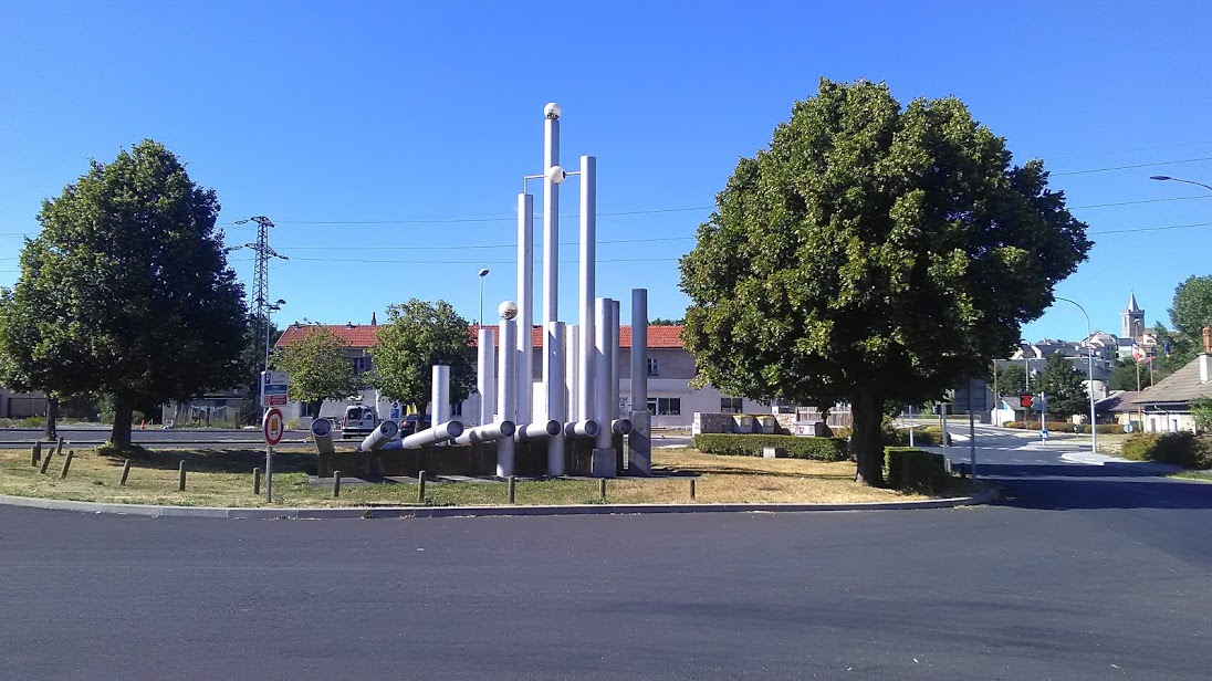 Sculpture devant l'usine métallurgique Arcelor Mittal à Saint-Chély-d'Apcher (Lozère)